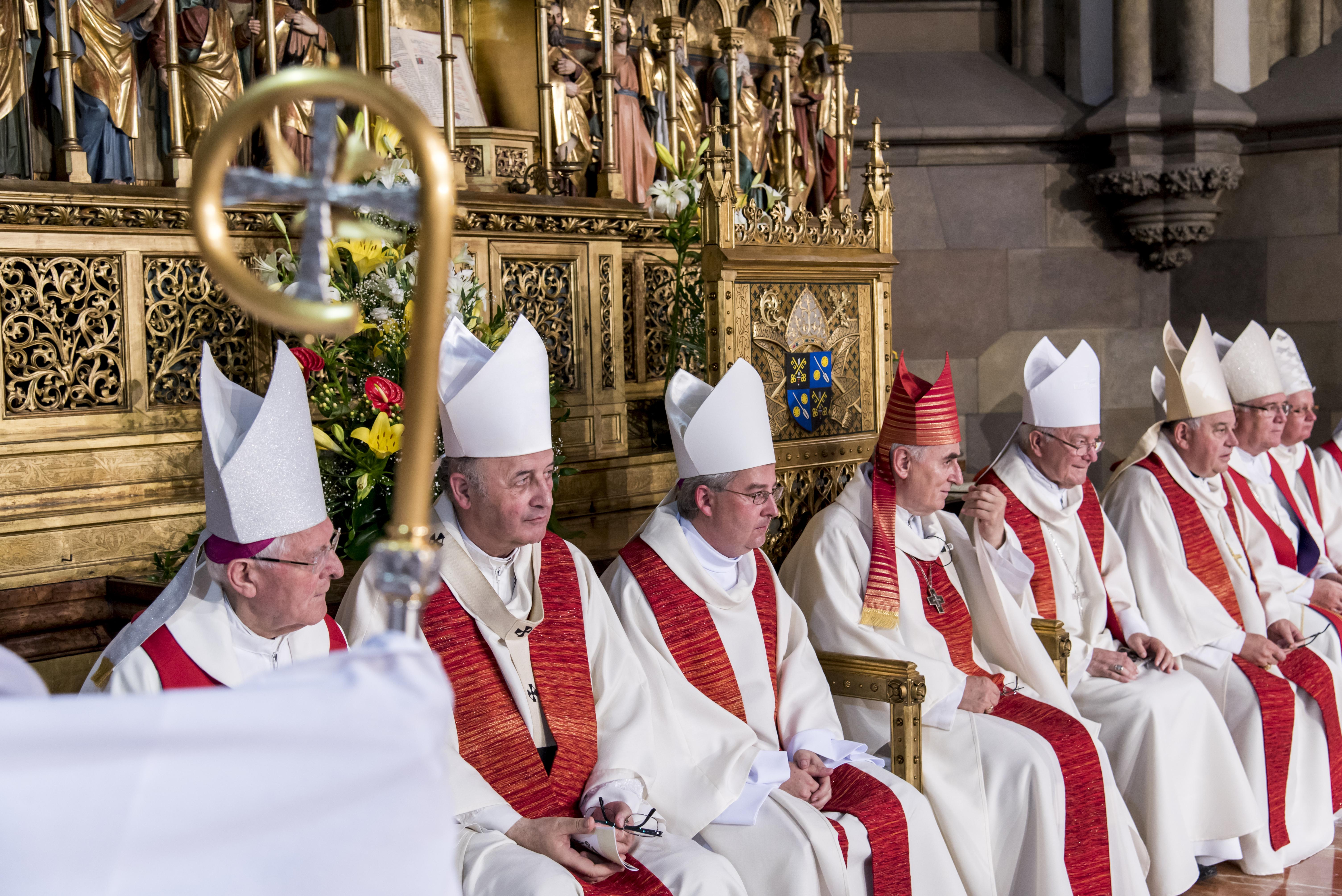 Fotografie z biskupského svěcení Pavla Konzbula v Brně 29. června 2016. Autor: Vít Kobza